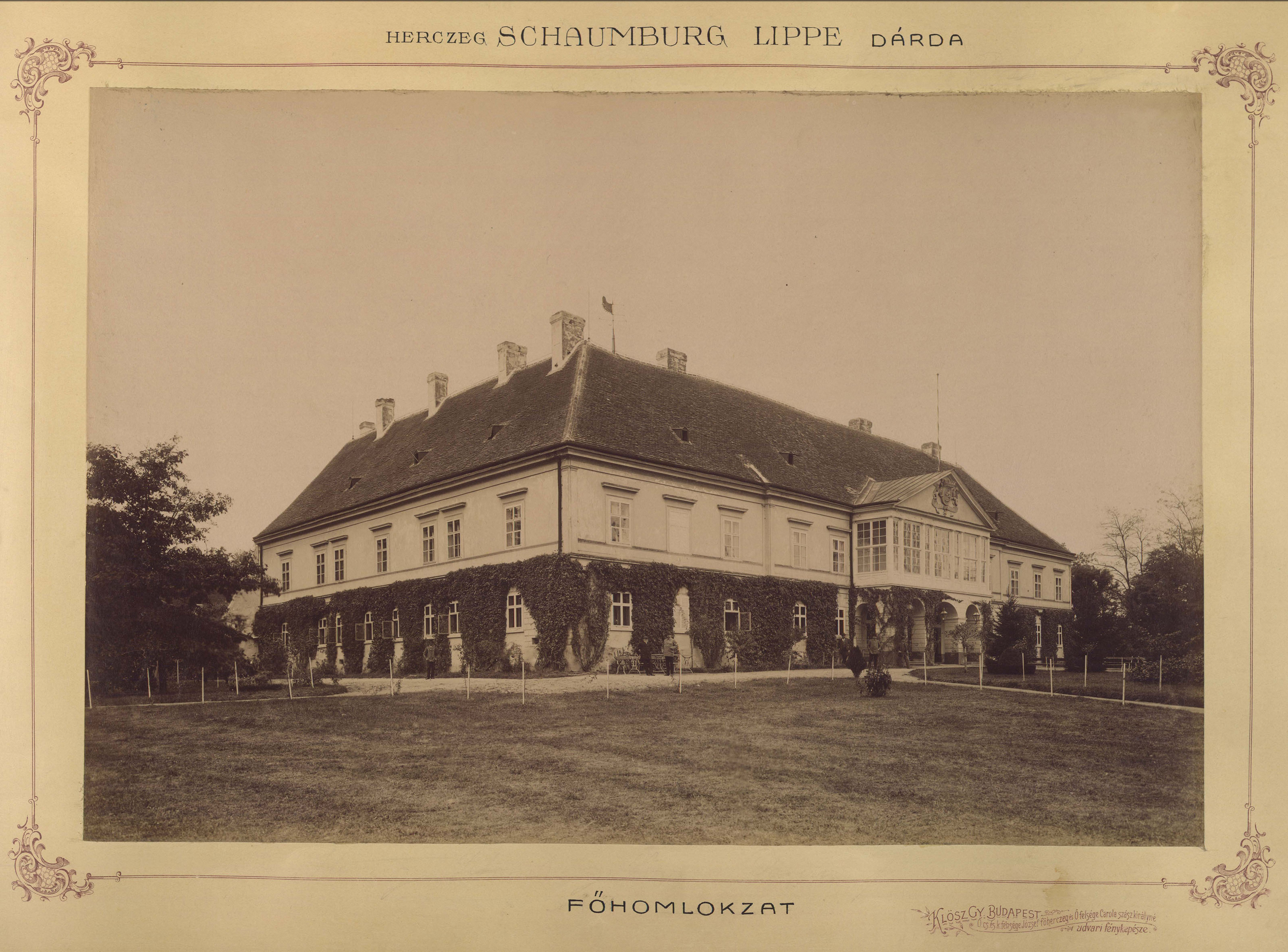 Schaumburg-Lippe György herceg kastélyának főhomlokzata. A felvétel 1895-1899 között készült. A kép forrását kérjük így adja meg: Fortepan / Budapest Főváros Levéltára. Levéltári jelzet: HU.BFL.XV.19.d.1.12.118 Location: Croatia, Darda